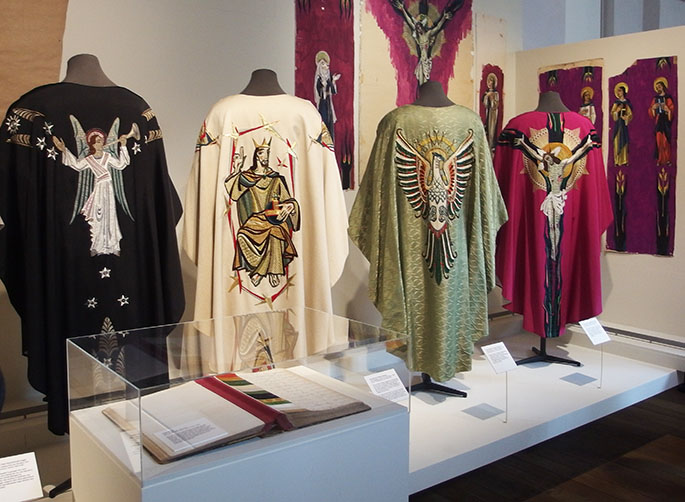 Vier kazuifels uit de jaren 1950, Stadelmaier tentoonstelling in Museum Catharijneconvent in Utrecht.